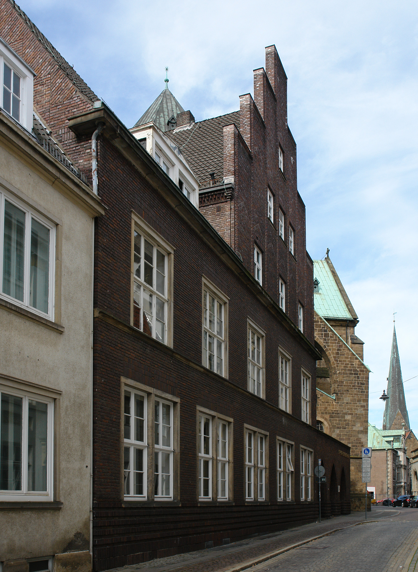 Gemeindehaus der Domgemeinde in Bremen, Sandstraße 10, 11, 12.Das abgebildete Objekt ist ein geschütztes Kulturdenkmal in der Freien Hansestadt Bremen, mit der Nr. 0180 beim Landesamt für Denkmalpflege registriert.